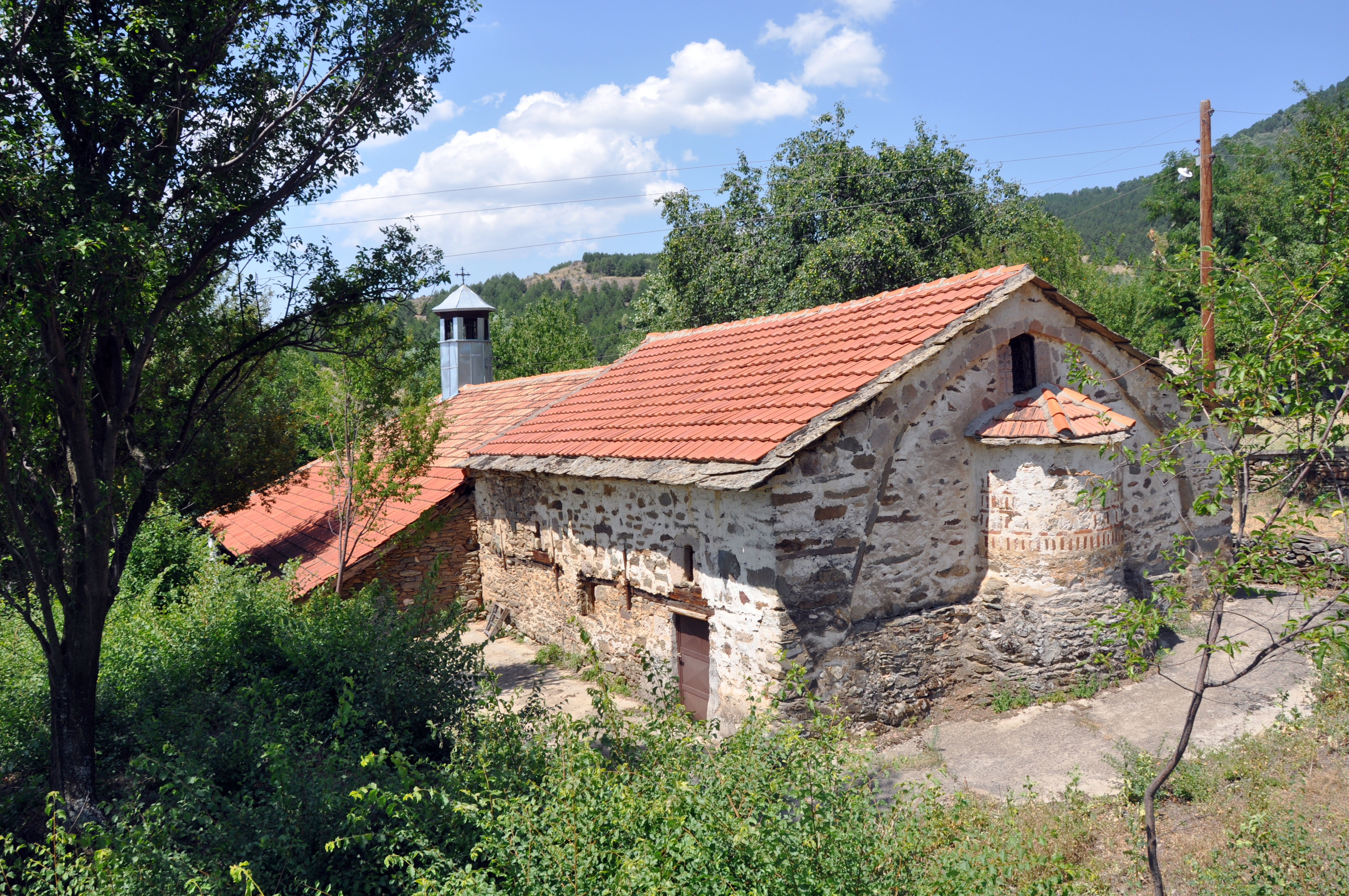 Црквата село Петралица